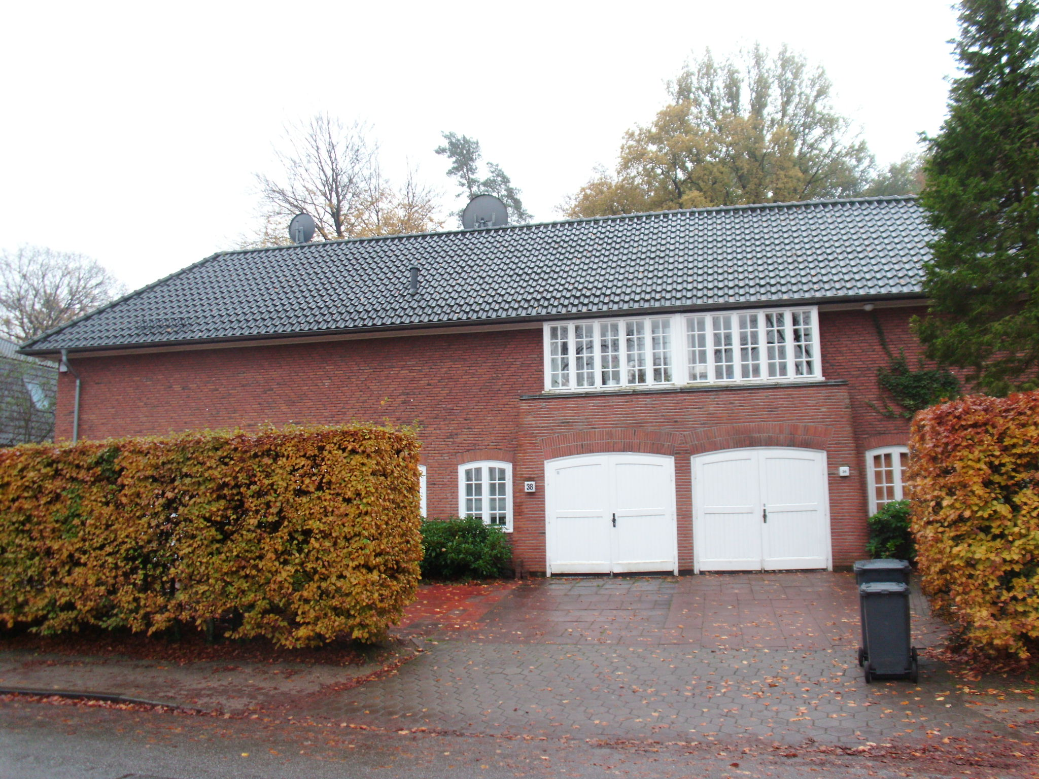 1930 bis 1940 von dem Architekten Rudolf Lodders errichtete Doppelwohnhausanlage This is a photograph of an architectural monument.